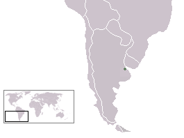 mapa de la ciudad Autónoma de Buenos Aires